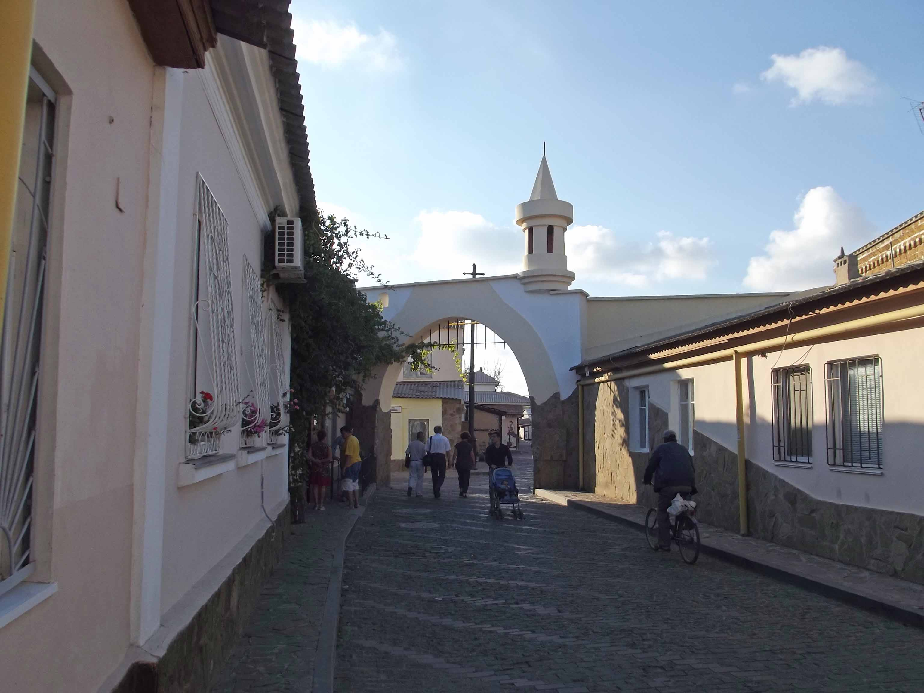 Караимская улица